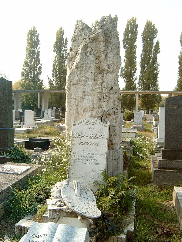 Katona Nándor (Szepesófalu, 1860. szeptember 12. – Budapest, 1932. augusztus 1.) festő sírja Budapesten. Kozma utcai zsidó temető: 5B-11-27.